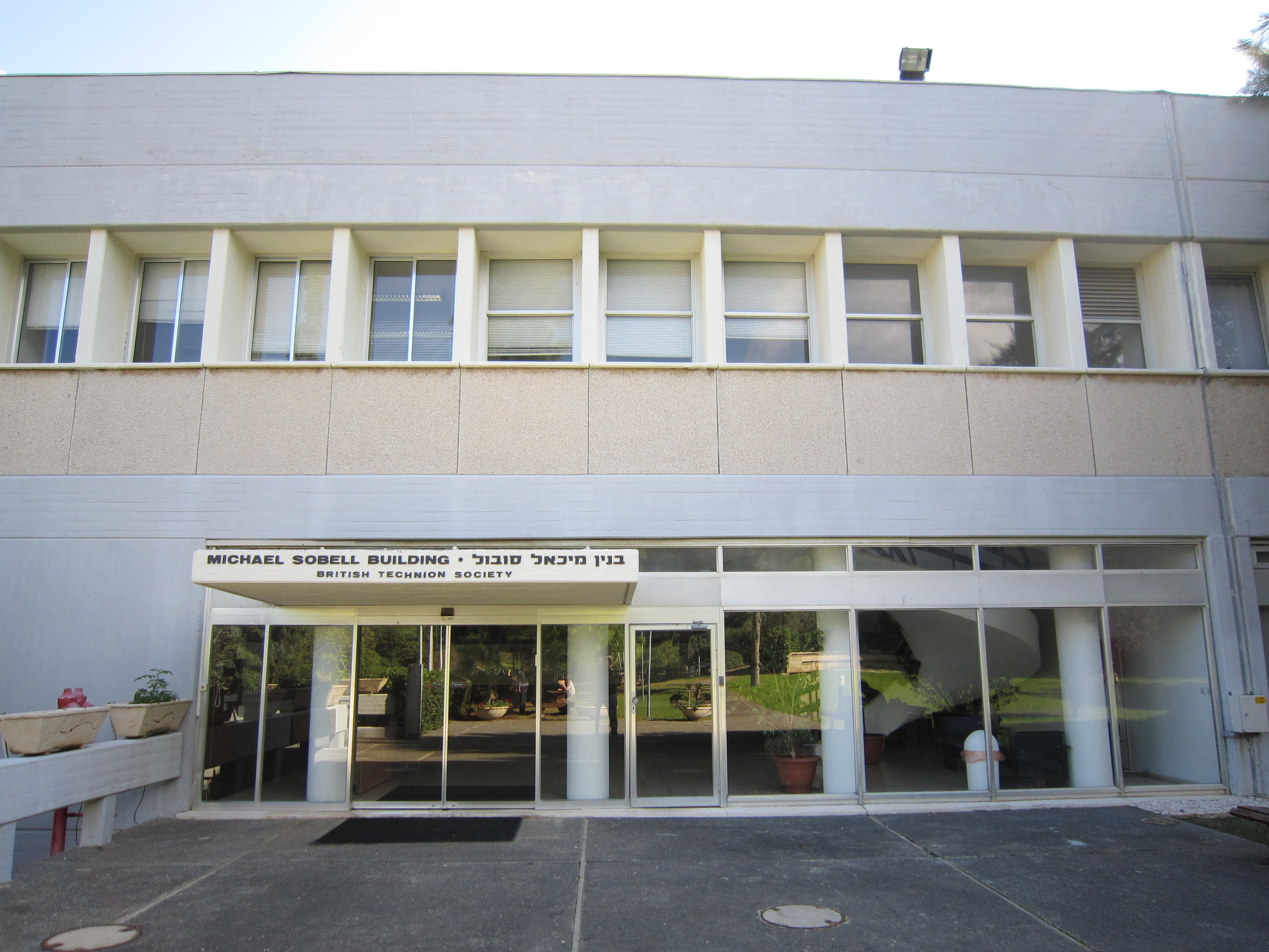 הפקולטה להנדסה כימית בטכניון